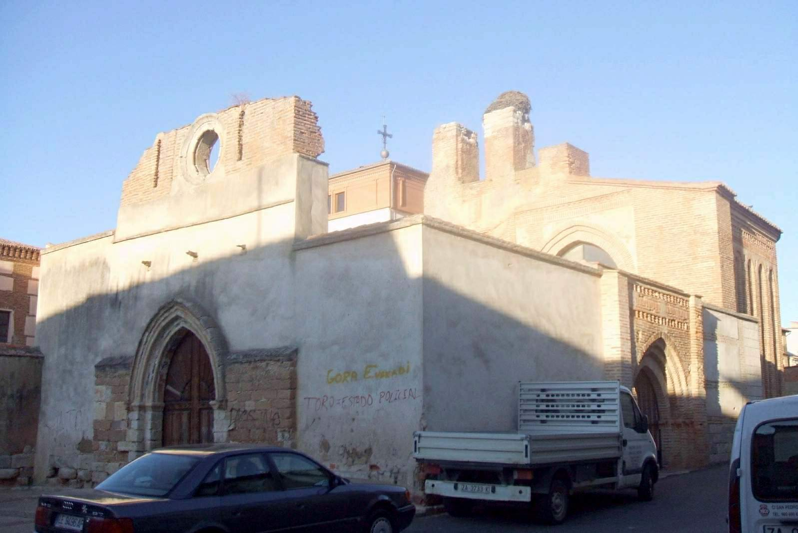 Iglesia de San Pedro del Olmo (Toro)